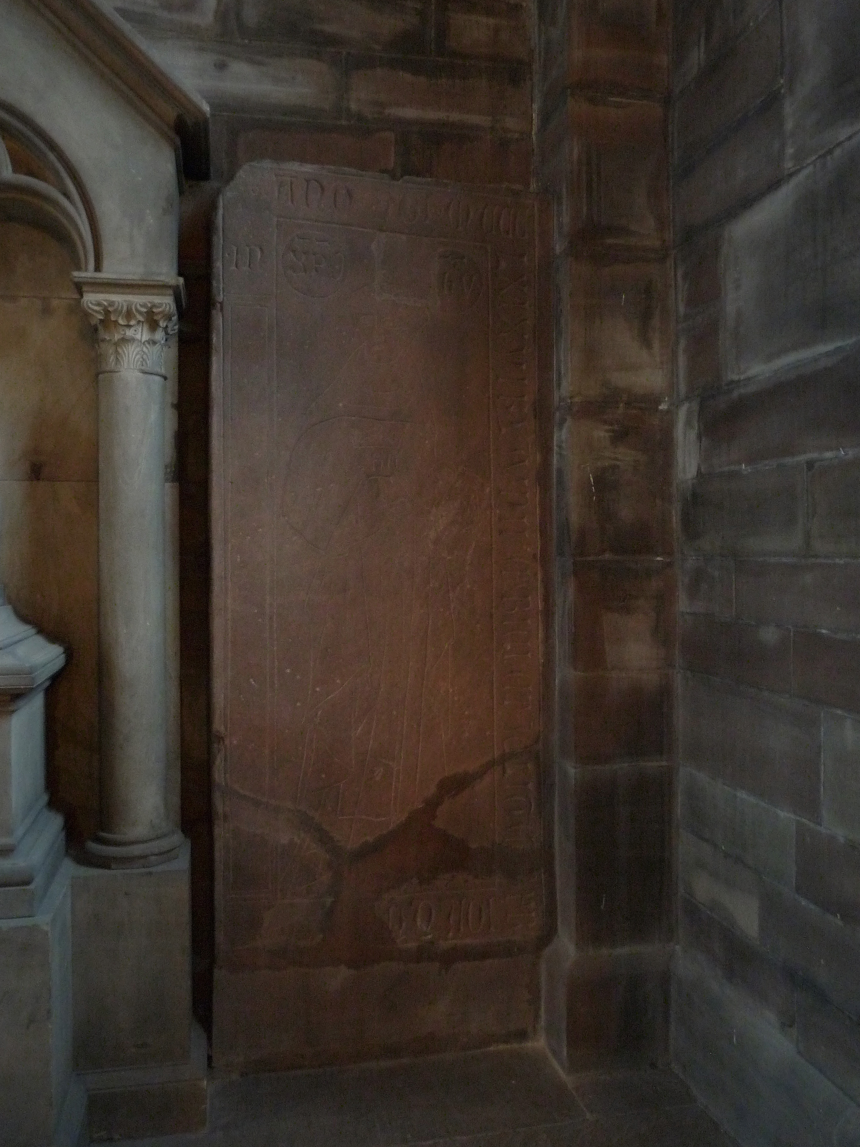 Strasbourg, Temple Neuf : pierre tombale de Jean Tauler